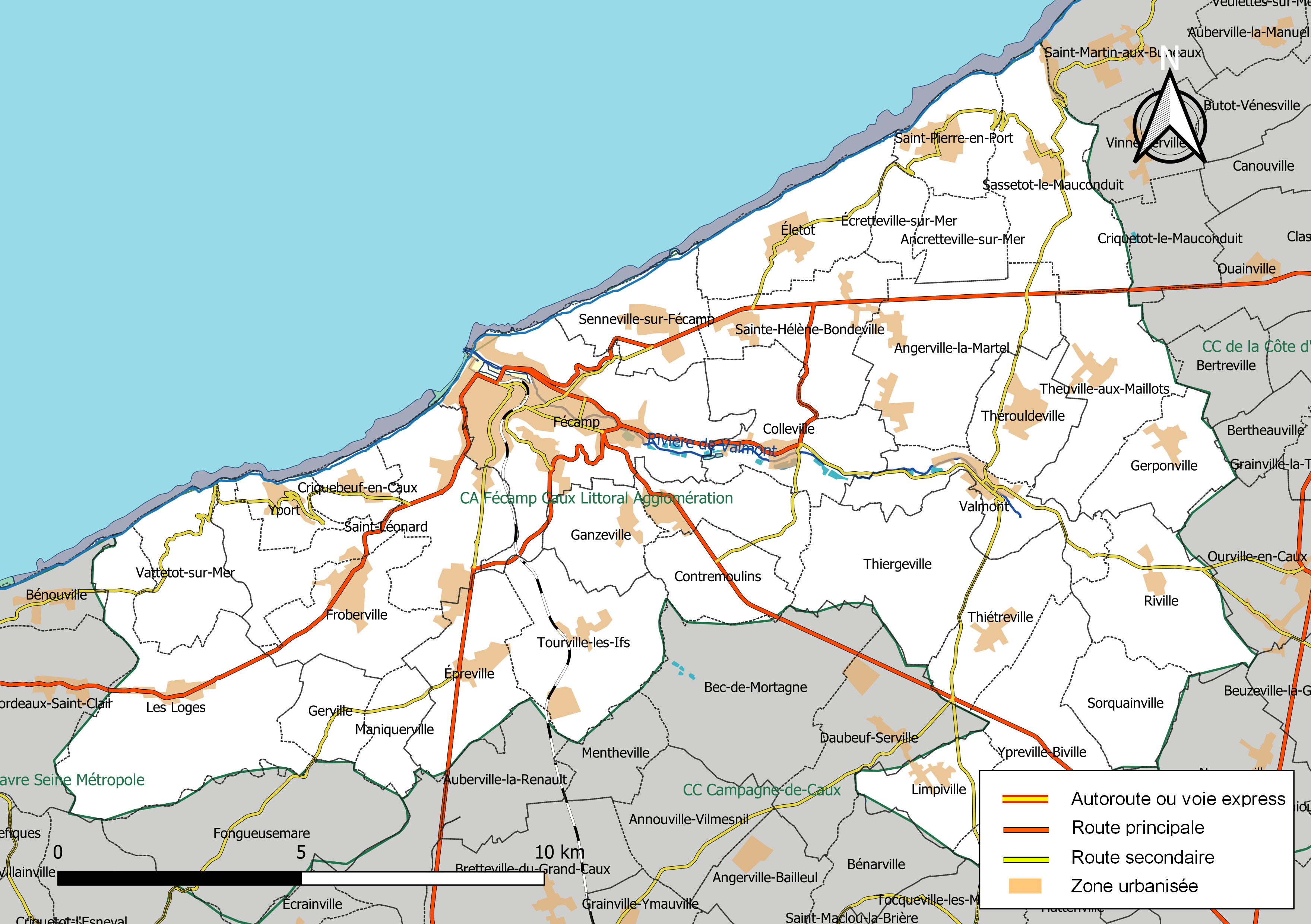 Carte géographique de la Communauté d'agglomération Fécamp Caux Littoral Agglomération, département de la Seine-Maritime, France. Composition au 1er janvier 2019.